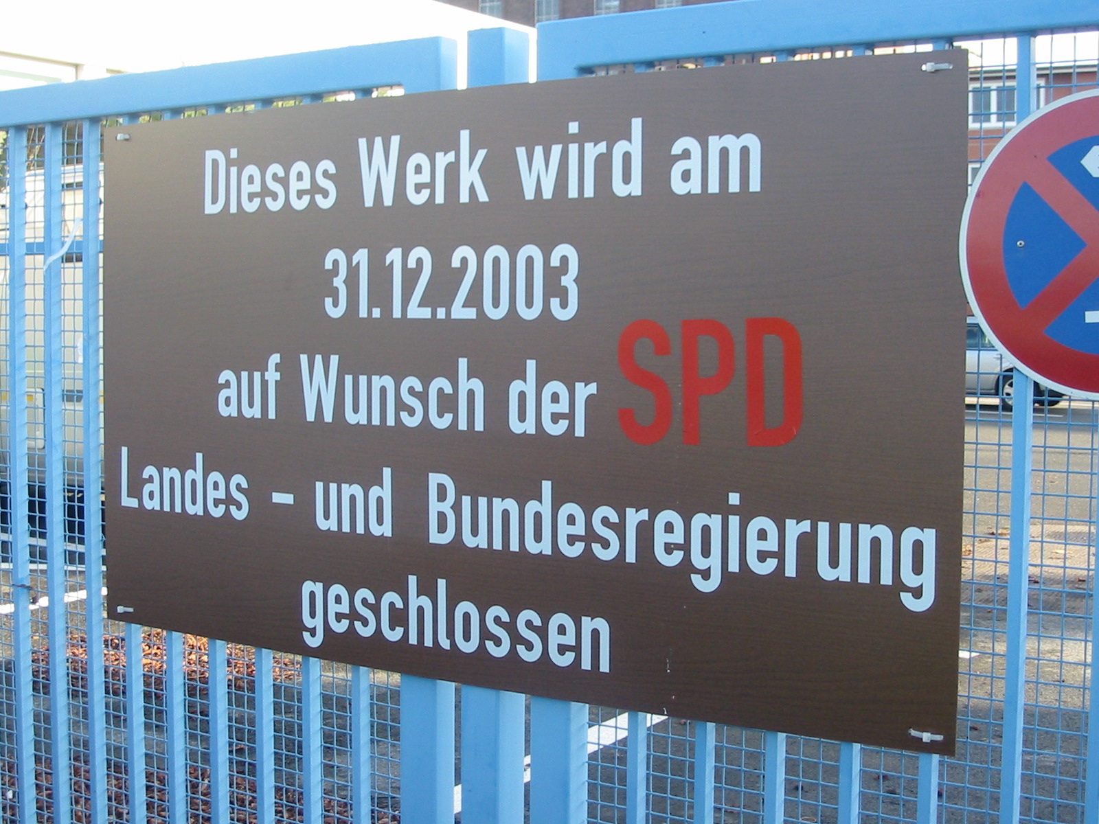 Hinweisschild am Ausbesserungswerk Opladen.